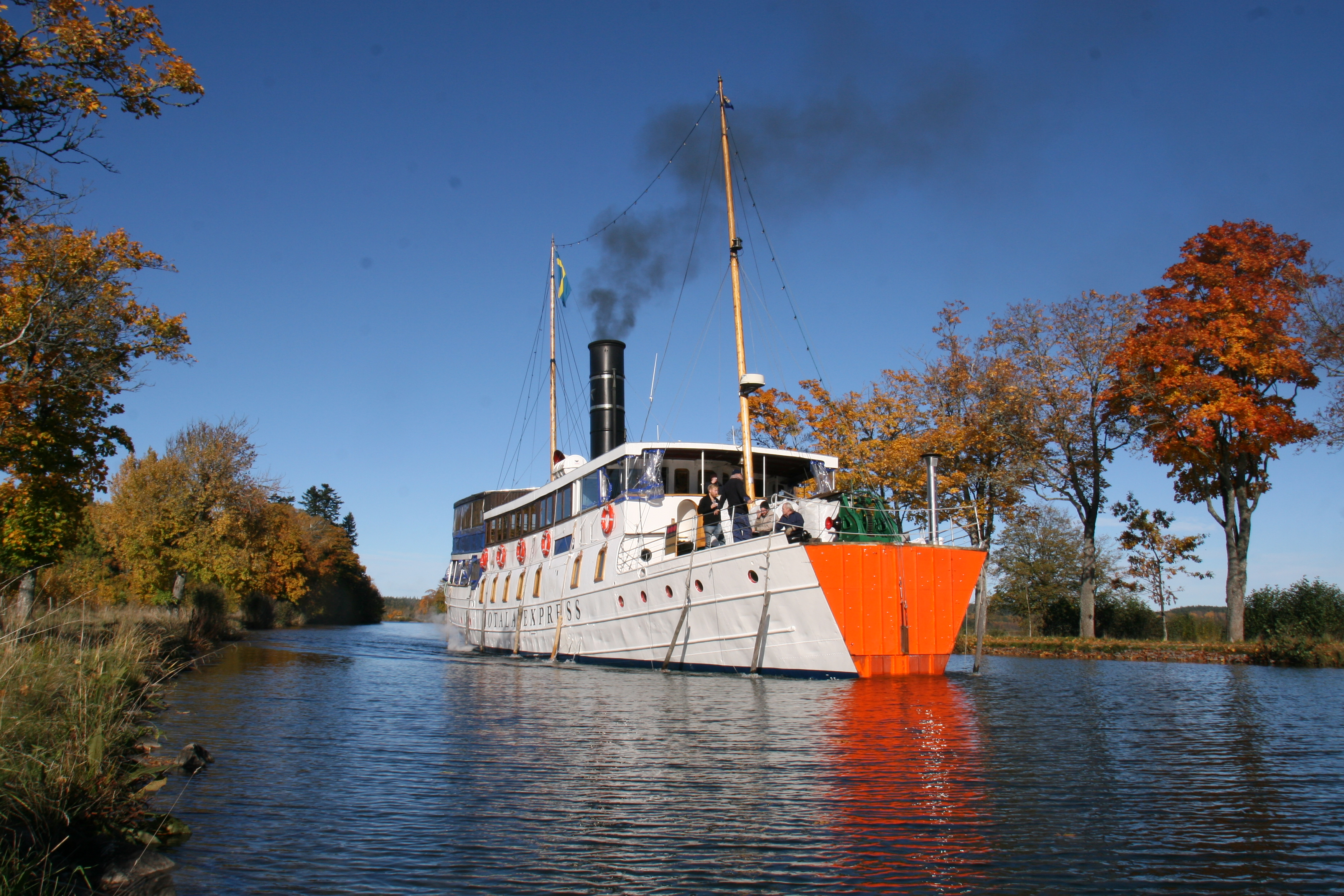 S/S Motala Express vid Brunneby på väg från Motala mot Stockholm